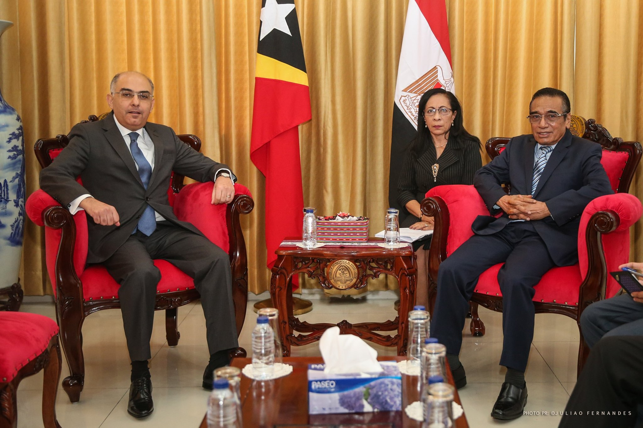 Der ägyptische Botschafter Ashraf Mohamed Moguib Sultan in Osttimor, mit Staatspräsident Francisco Guterres